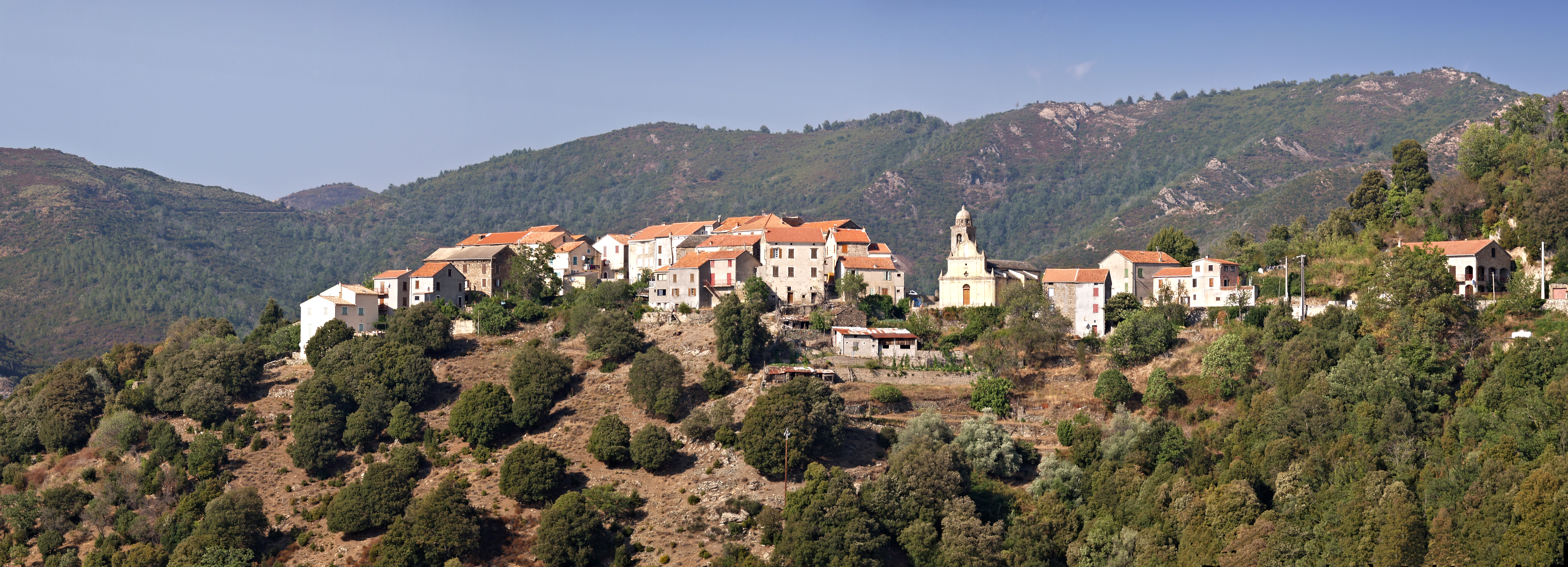 Focicchia (Corsica) - Panorama du village